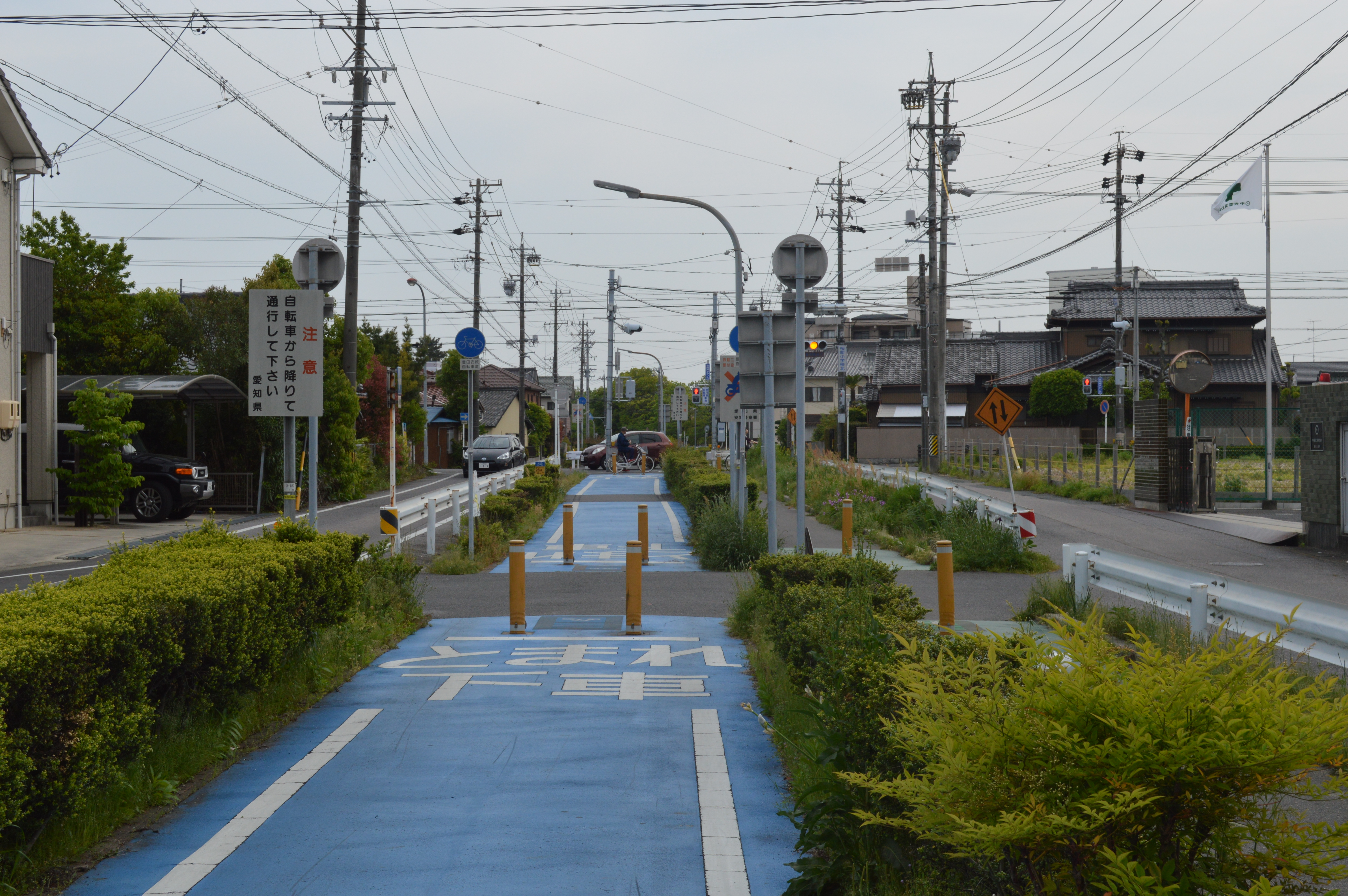 豊田安城サイクリングロード 「桜町小学校北」交差点北、愛知県安城市